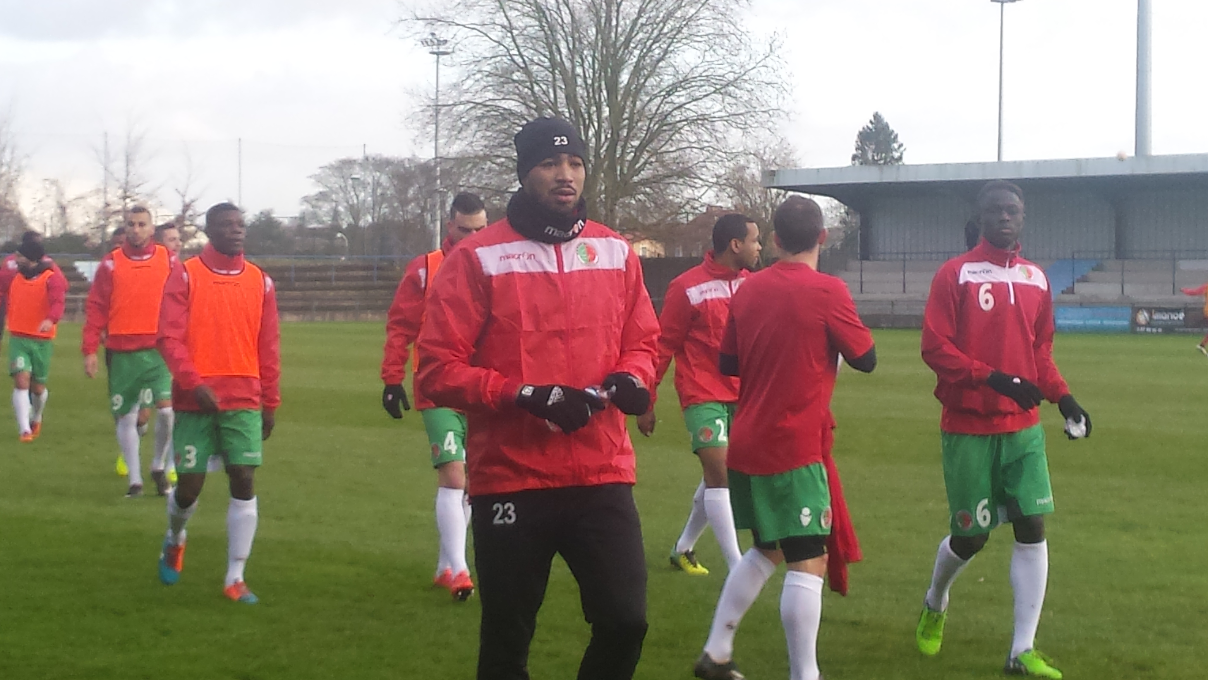 Albert Baning (au premier plan) avant la rencontre Lens B - Sedan, au Stade François-Blin d'Avion, match comptant pour le championnat de France de CFA (quatrième division française), le 24 janvier 2015.